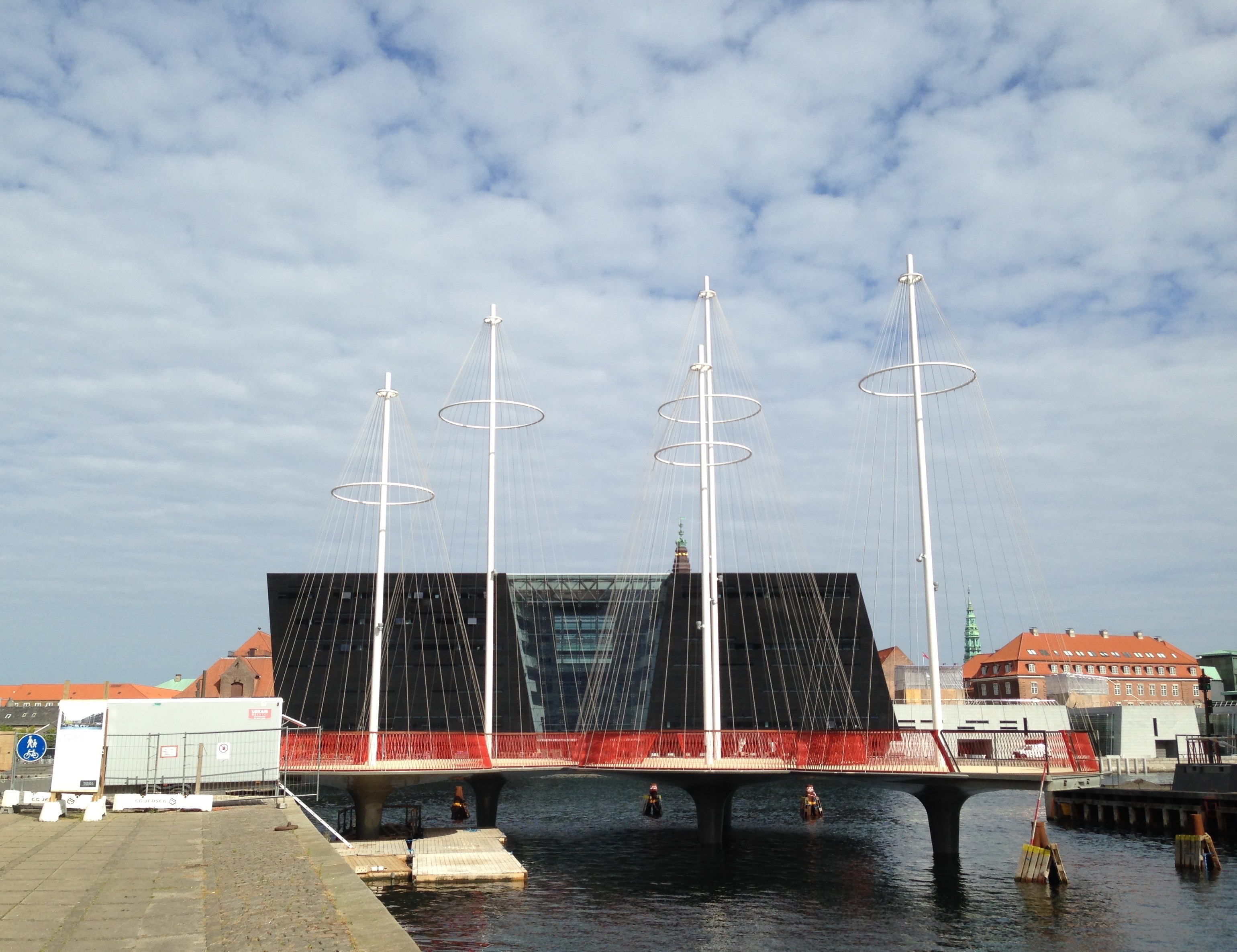 Cirkelbroen with Den Sorte Diamant as a backdrop in Copenhagen, Denmark